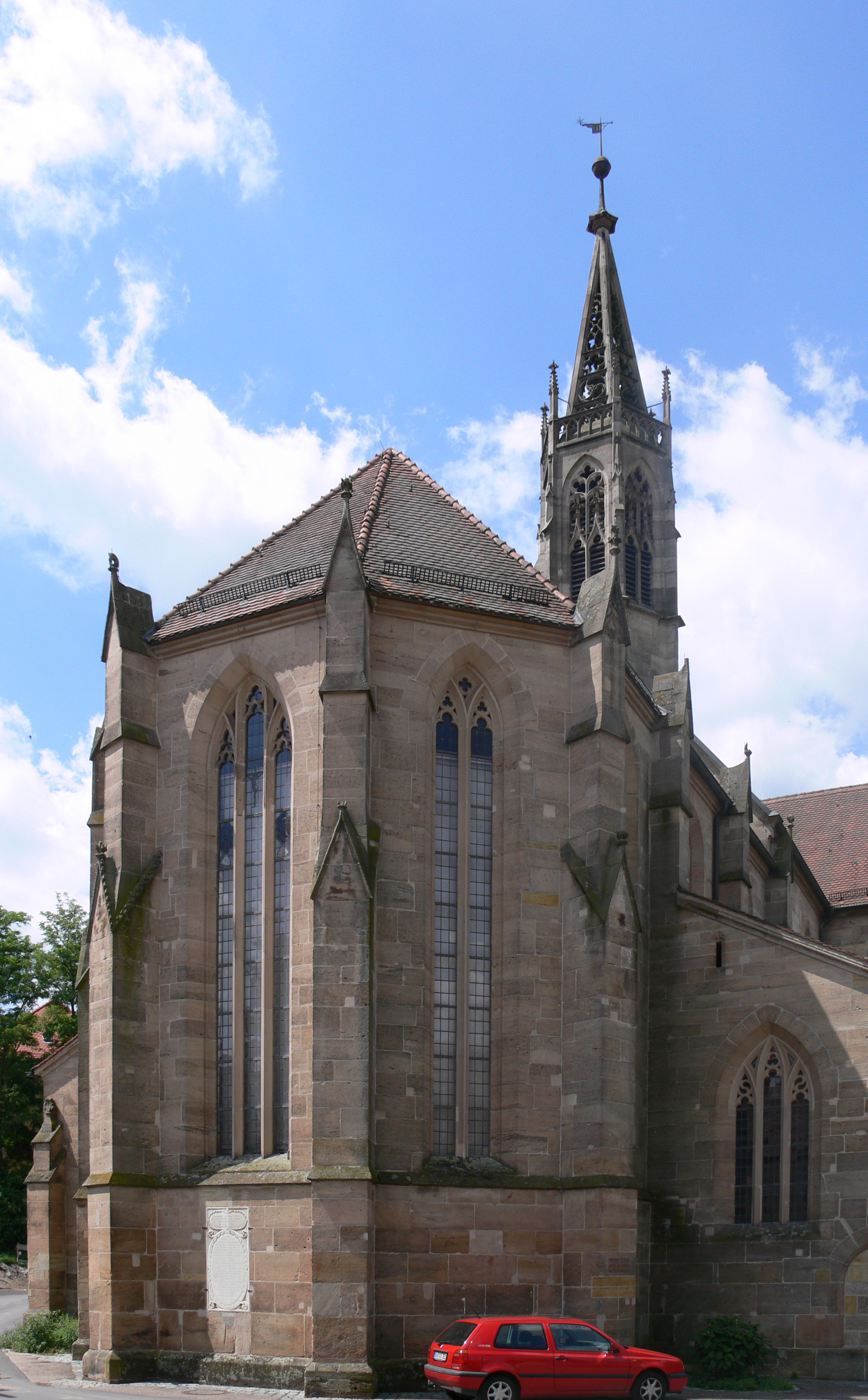 Heilsbronn, Landkreis Ansbach Münster; Außenansicht, Osten, gotisches Chorhaupt